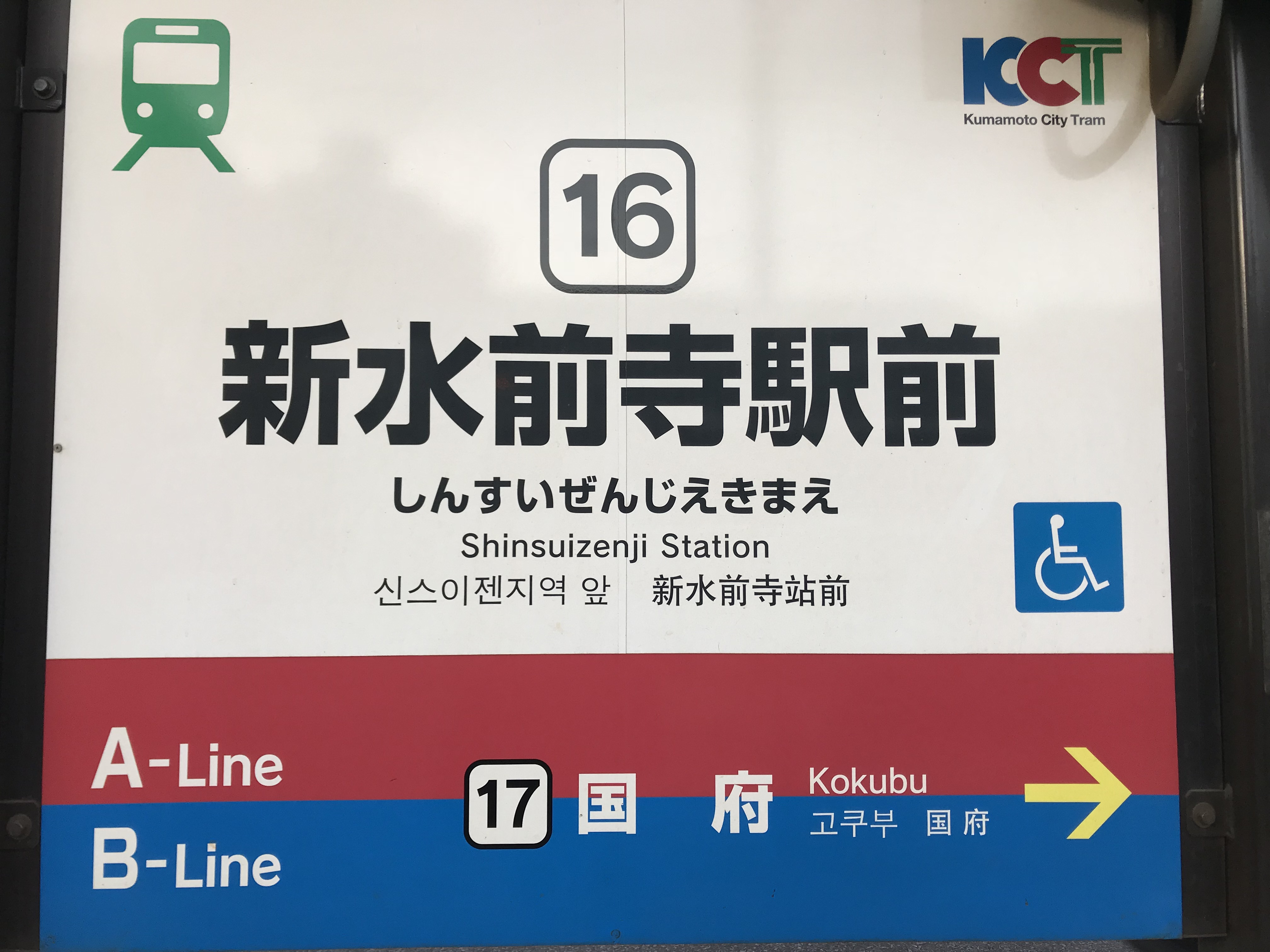 新水前寺駅前停留場の駅名標